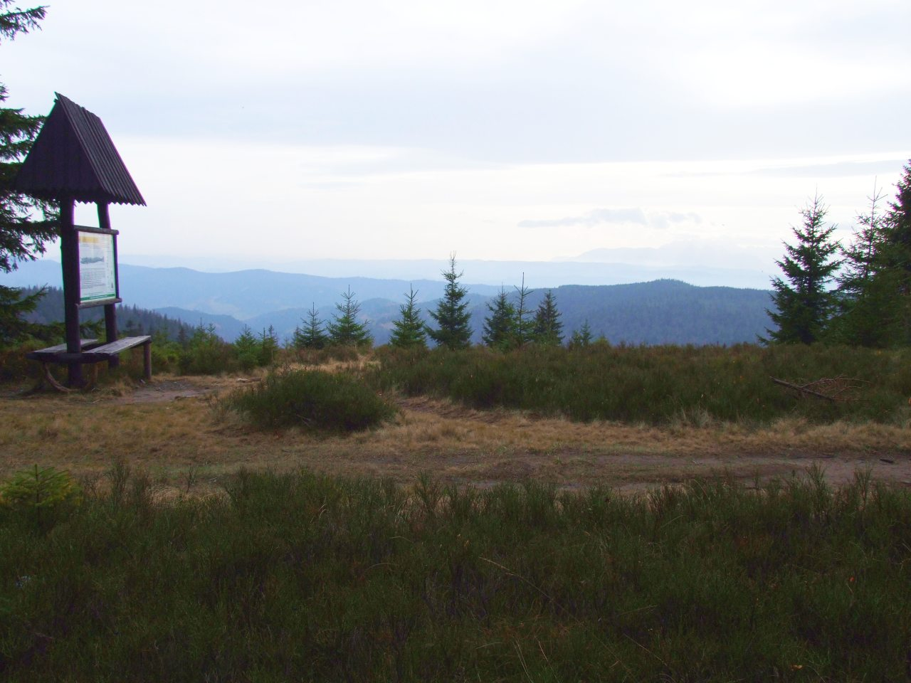 Polana Przysłop Górny